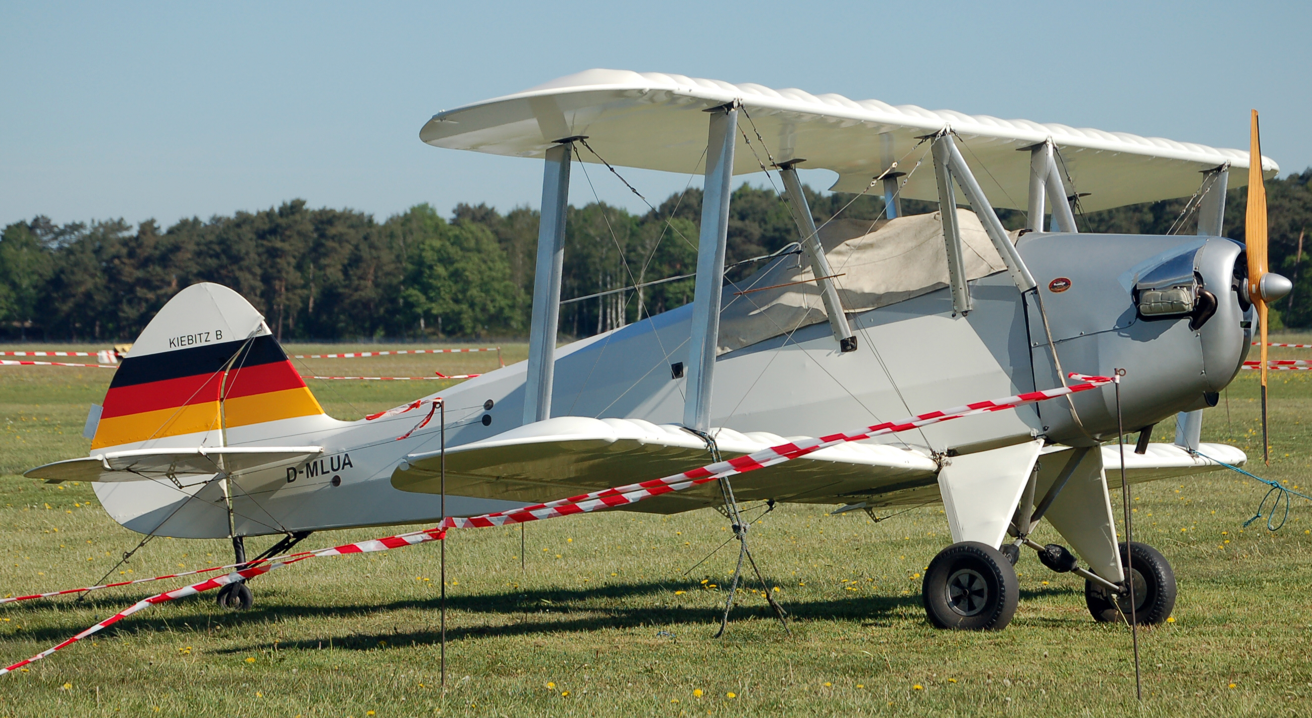 Platzer Kiebitz B (D-MLUA) auf dem Flugplatz Uetersen